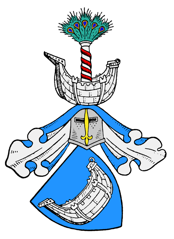 Wappen der Familie von Bothmer.